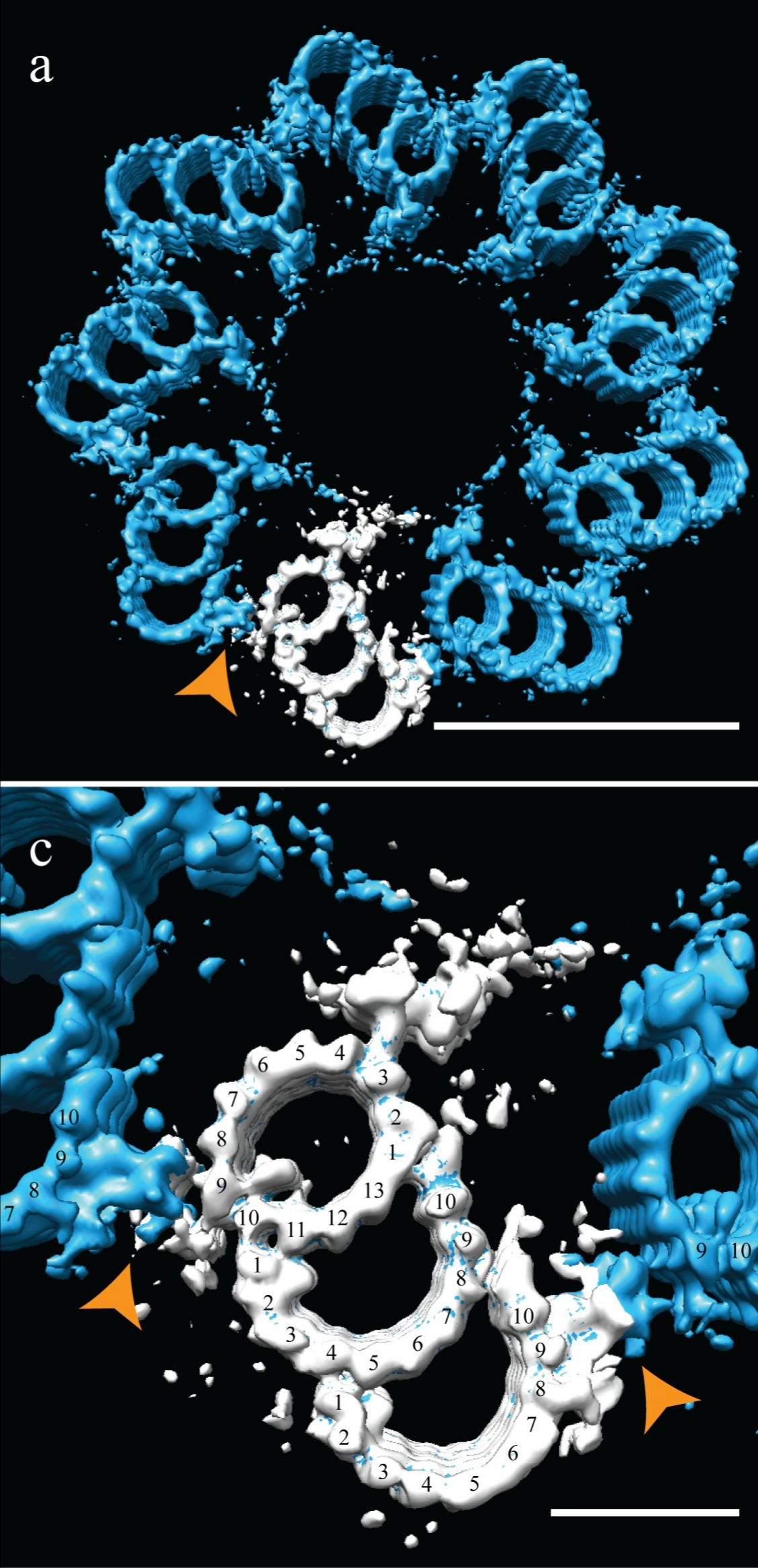 Figura 4. La corrección de la simetría, reveló nuevas conexiones en el centríolo distal del ovario de hámster chino (CHO). Utilizando la simetría de estudios publicados sobre centríolos de mamíferos, se determinó la simetría para el centríolo proximal y distal. AyC) Proporcionó una geometría de centríolo proximal, donde los conectores AC (puntas de flecha naranjas) de los microtúbulos triples adyacentes, encajan y recapitulan la geometría como se publicó anteriormente. El ovario de hámster chino (CHO) generó un mapa con tripletes, que consta de un túbulo A completo de 13 protofilamentos y túbulos B y C de 10 protofilamentos. Ambas partes del conector de CA (puntas de flecha dobles verdes) que conectan tripletes adyacentes, al igual que la cabeza de alfiler (flecha dorada).